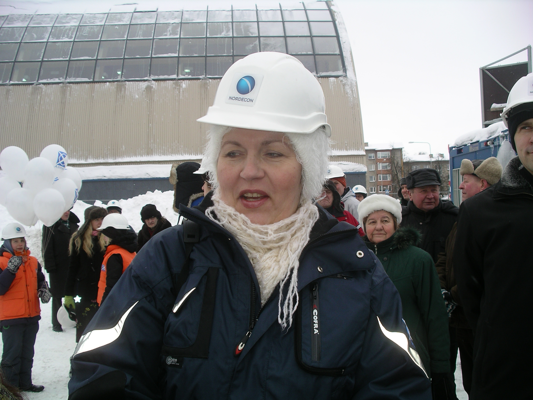 Tiiu Sild